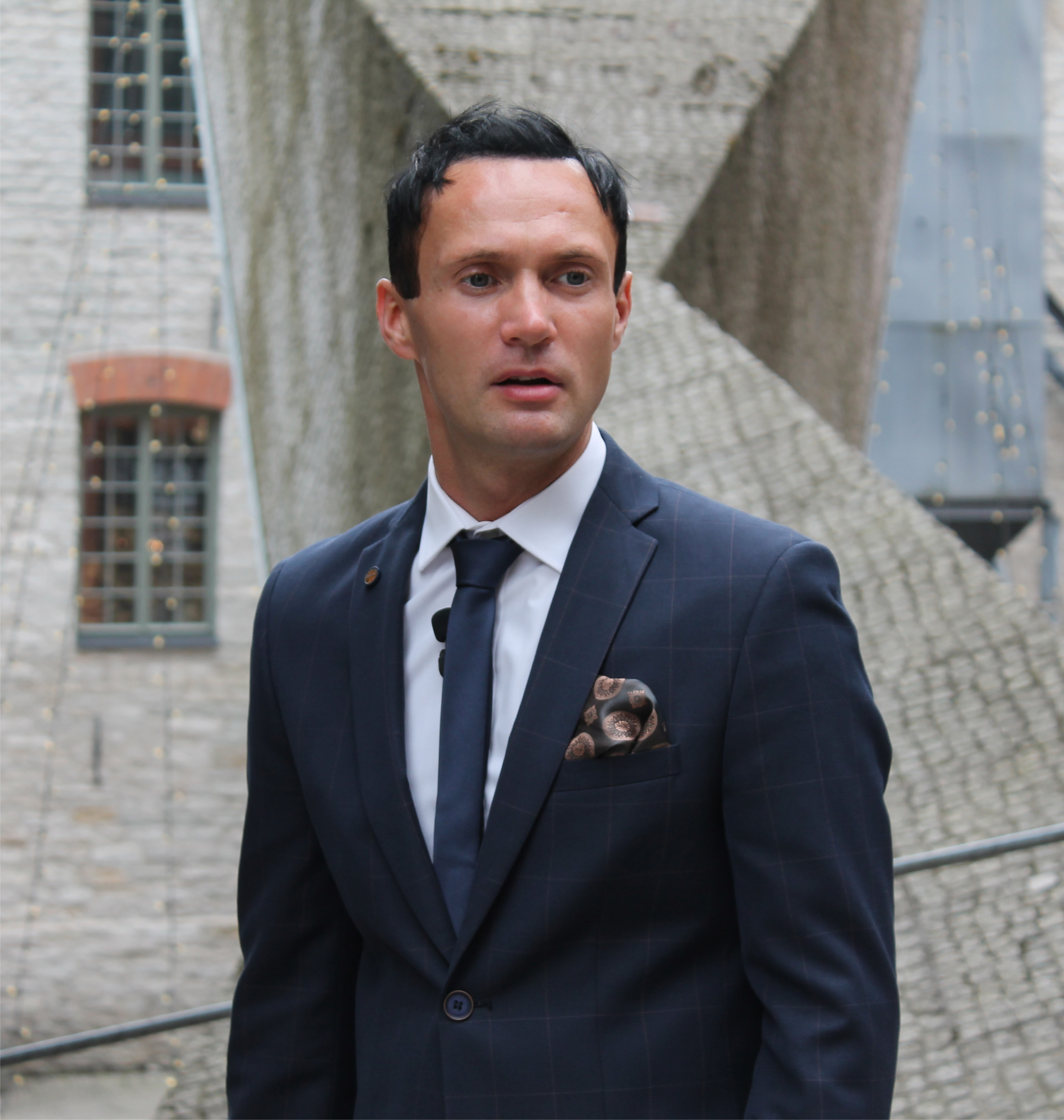 Allan Keiani intervjuu